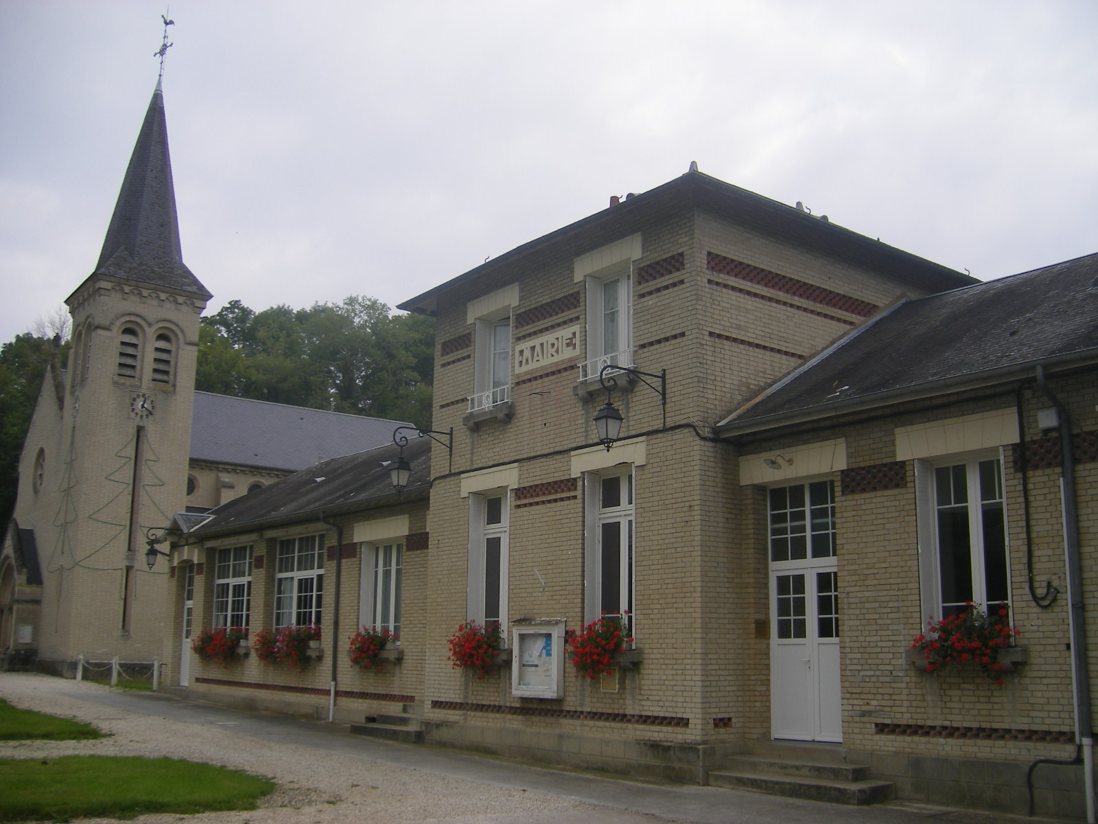 Nampcel